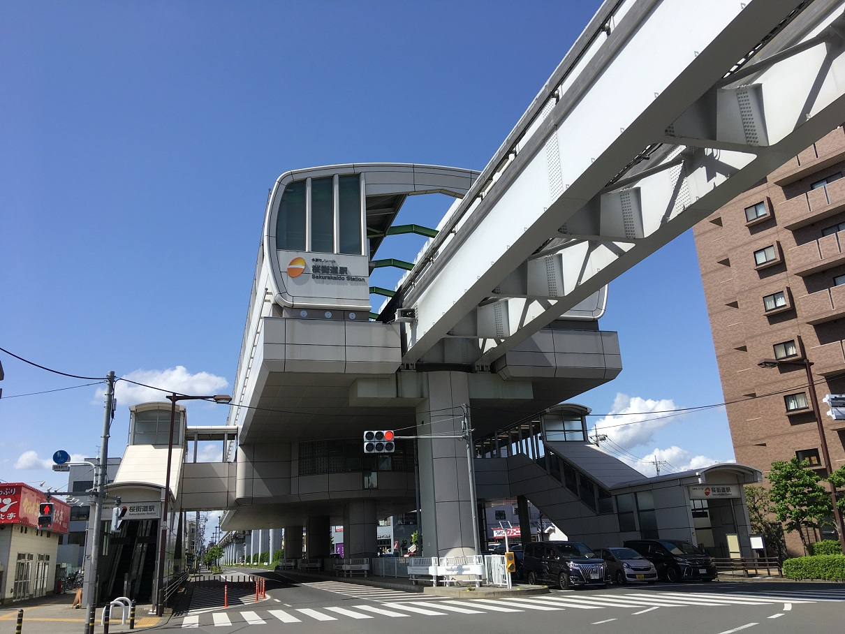 桜街道駅舎（上り方面側）